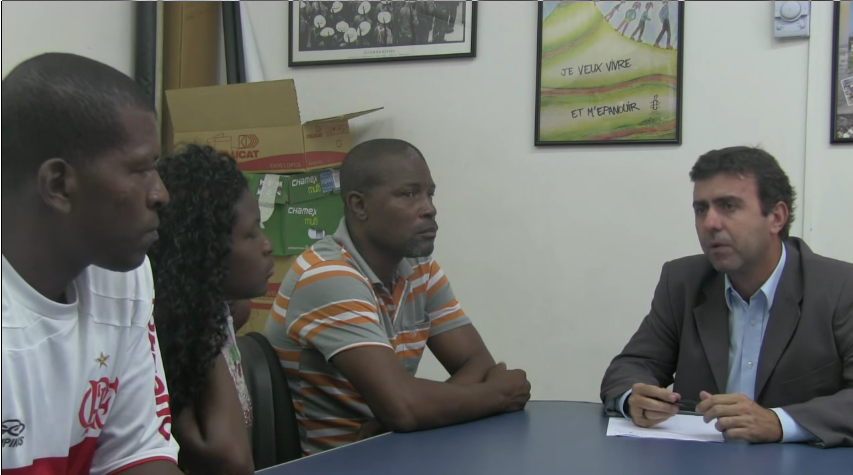 Comissão de Direitos Humanos e Cidadania da Alerj recebendo família de Cláudia Silva Ferreira